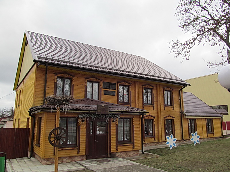 Любань. Новая сінагога